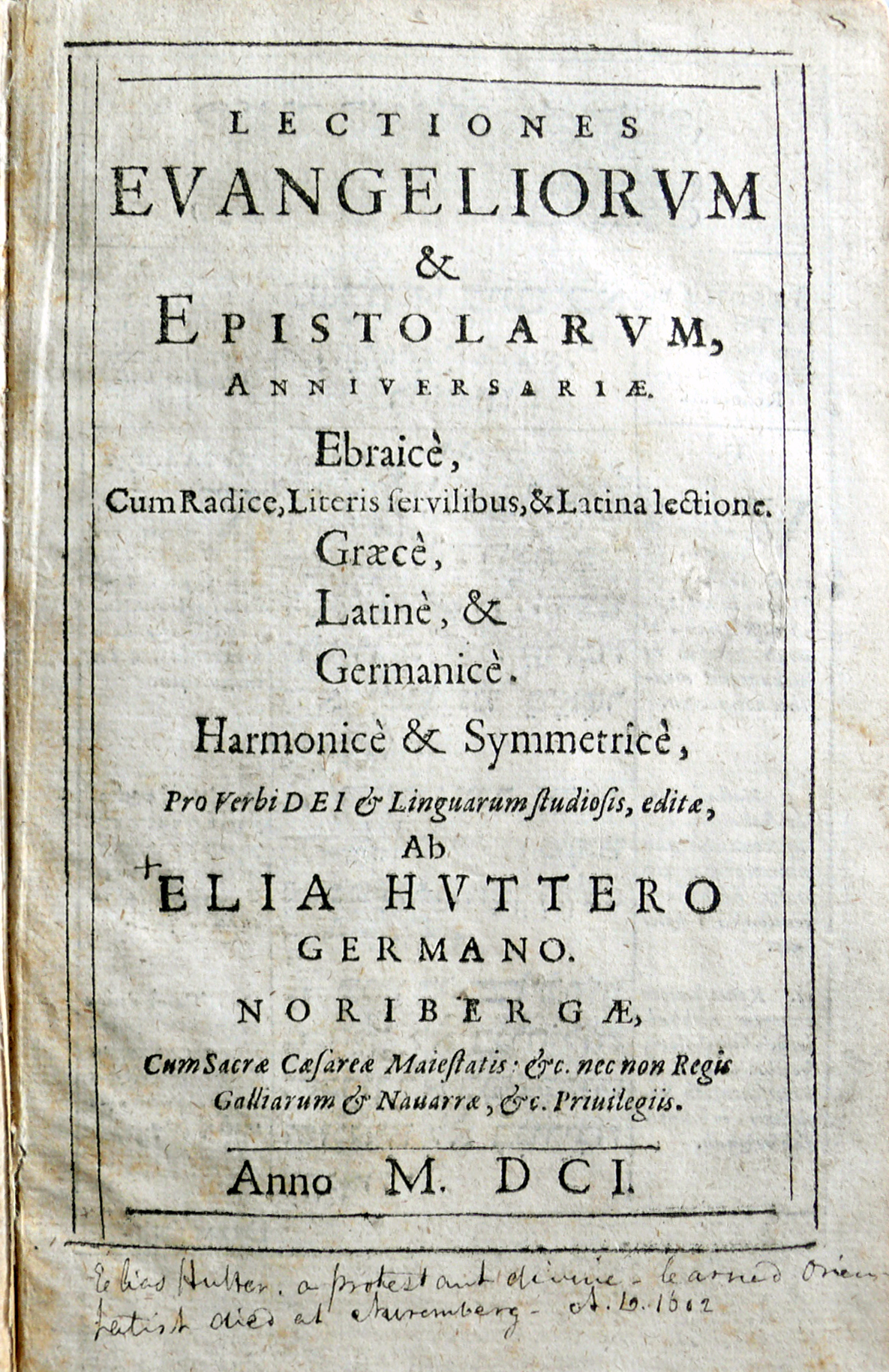 Elias Hutter: Lectiones Evangeliorum et Epistolarum,... Nürnberg 1601 (Titelblatt)